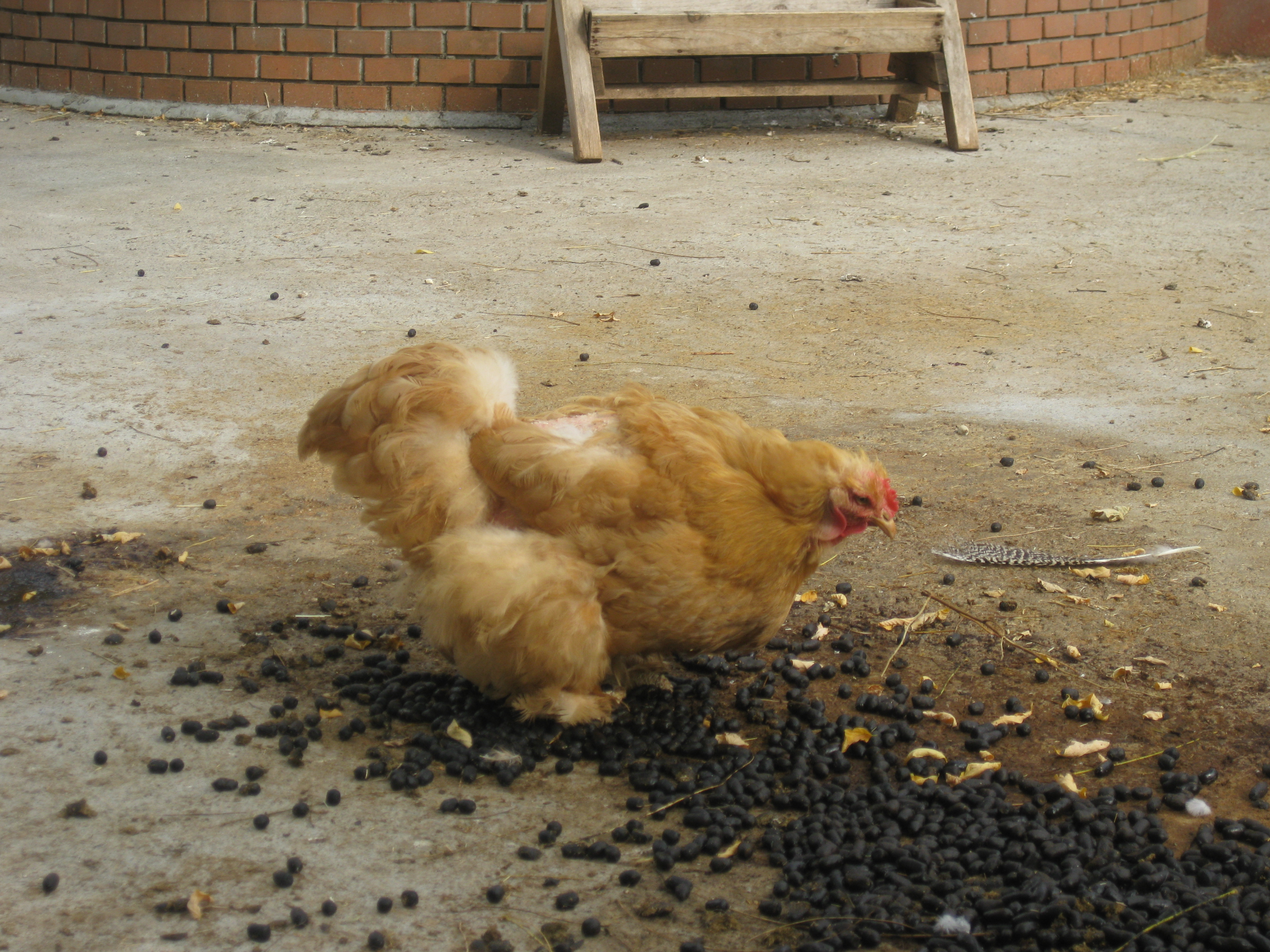 un gallo a milano